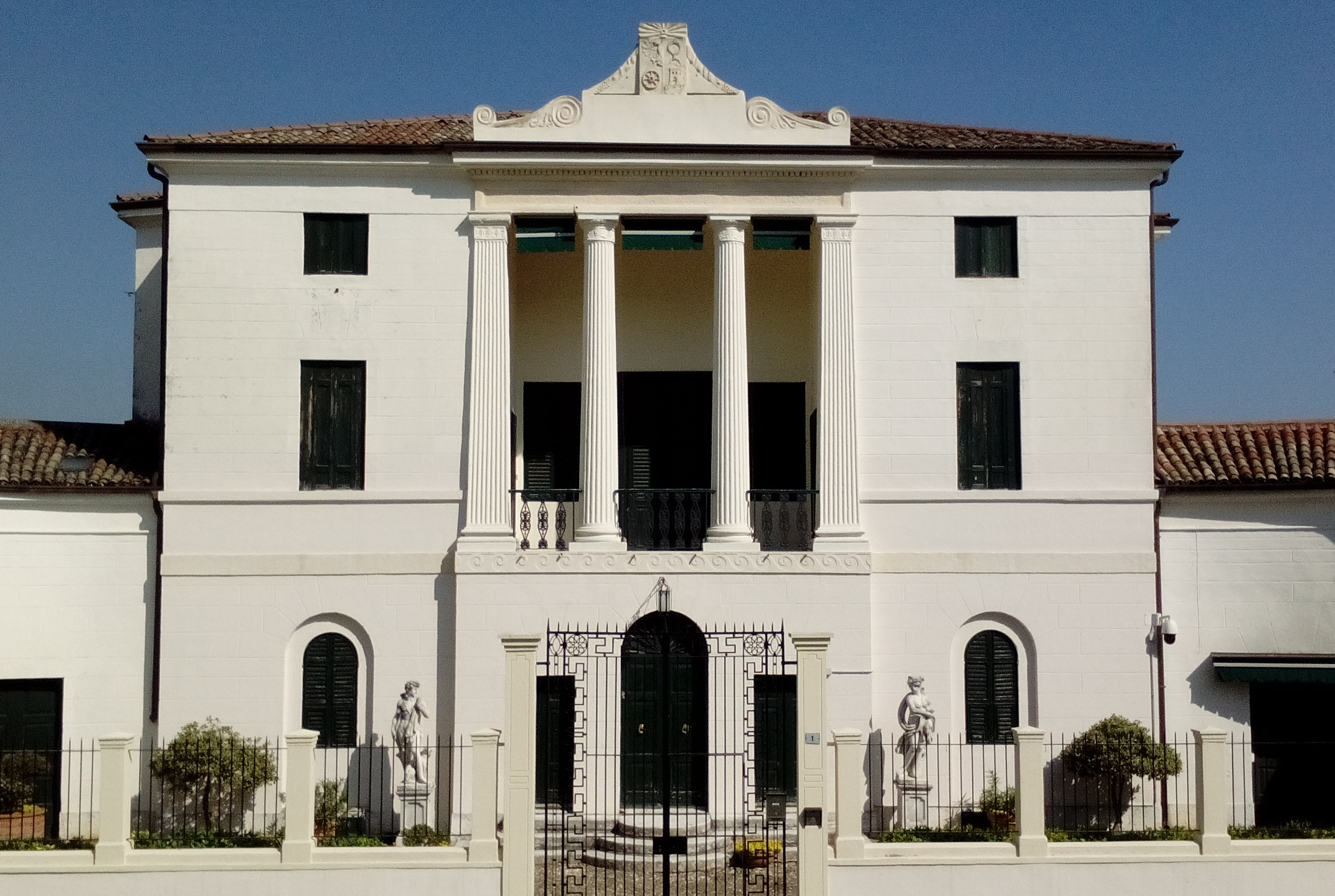 Facciata della Villa Cometti a San Pietro in Cariano (provincia di Verona).